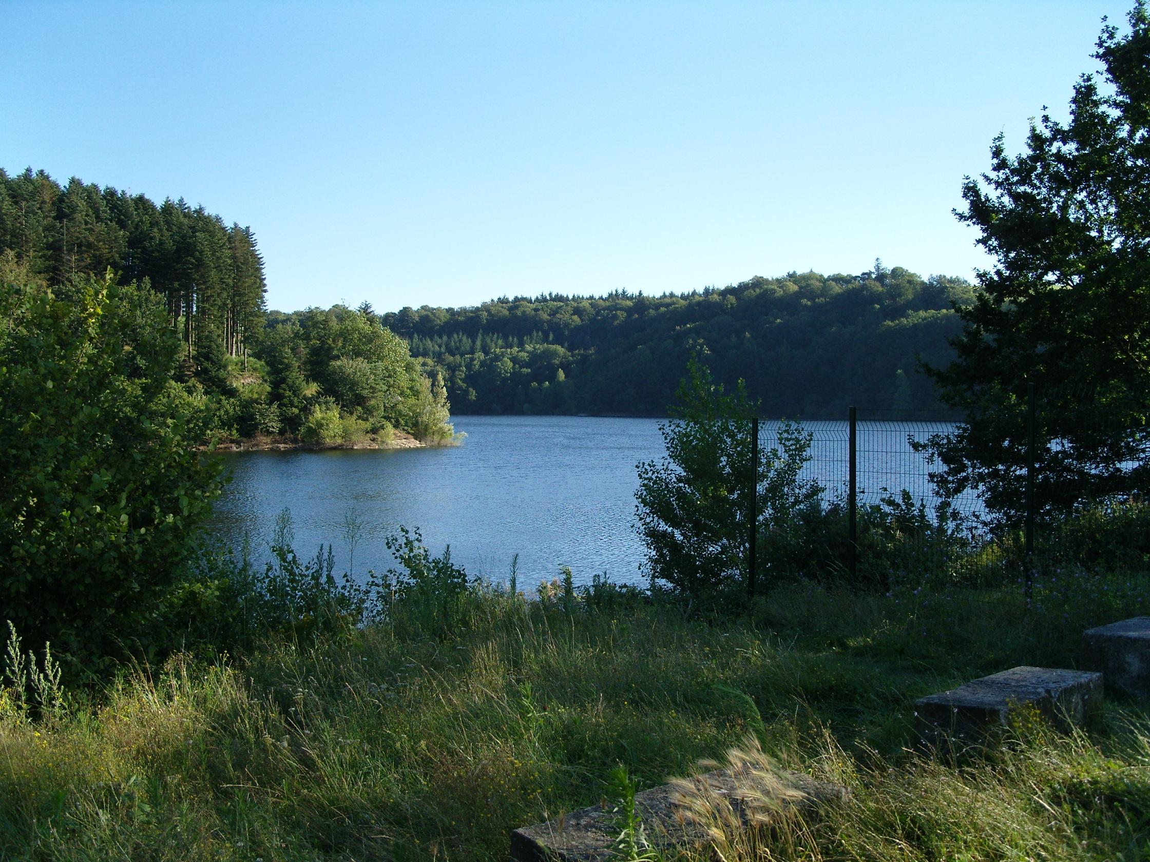 Lac des Cammazes près de son Barrage, dans le Tarn (81), France